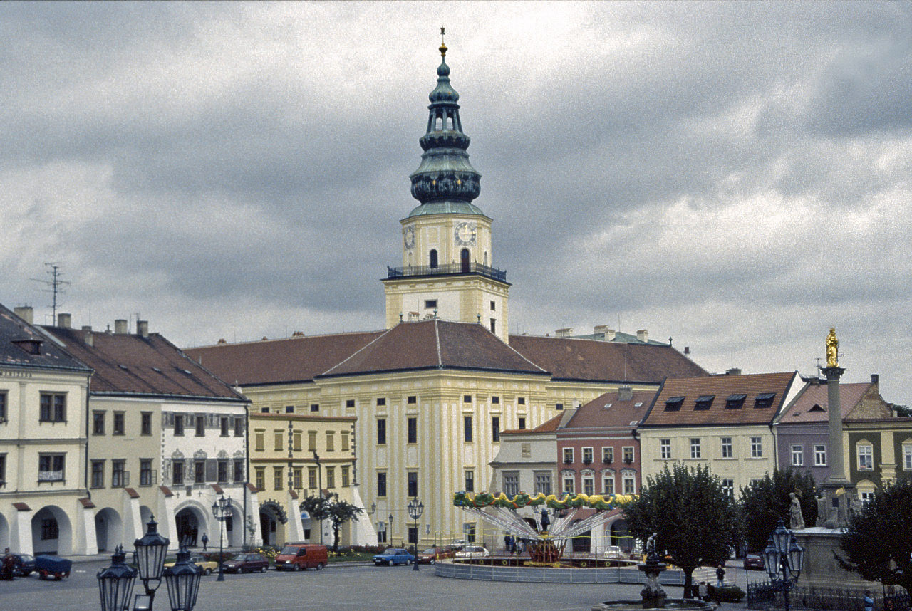 Kroměříž, pohled z náměstí k arcibiskupskému paláci Kroměříž, marketplace & archbishop castle